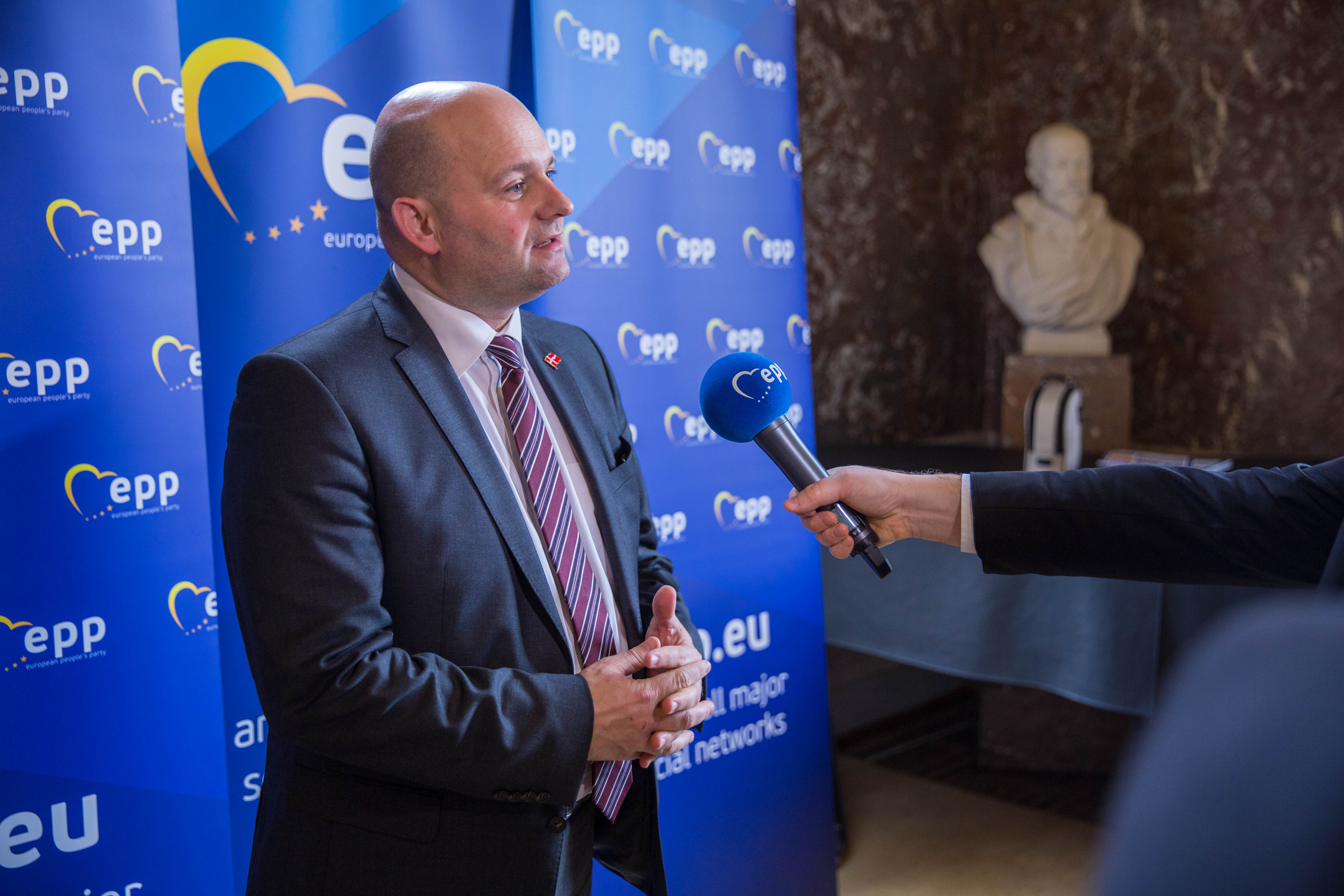 EPP Summit, Brussels, March 2017